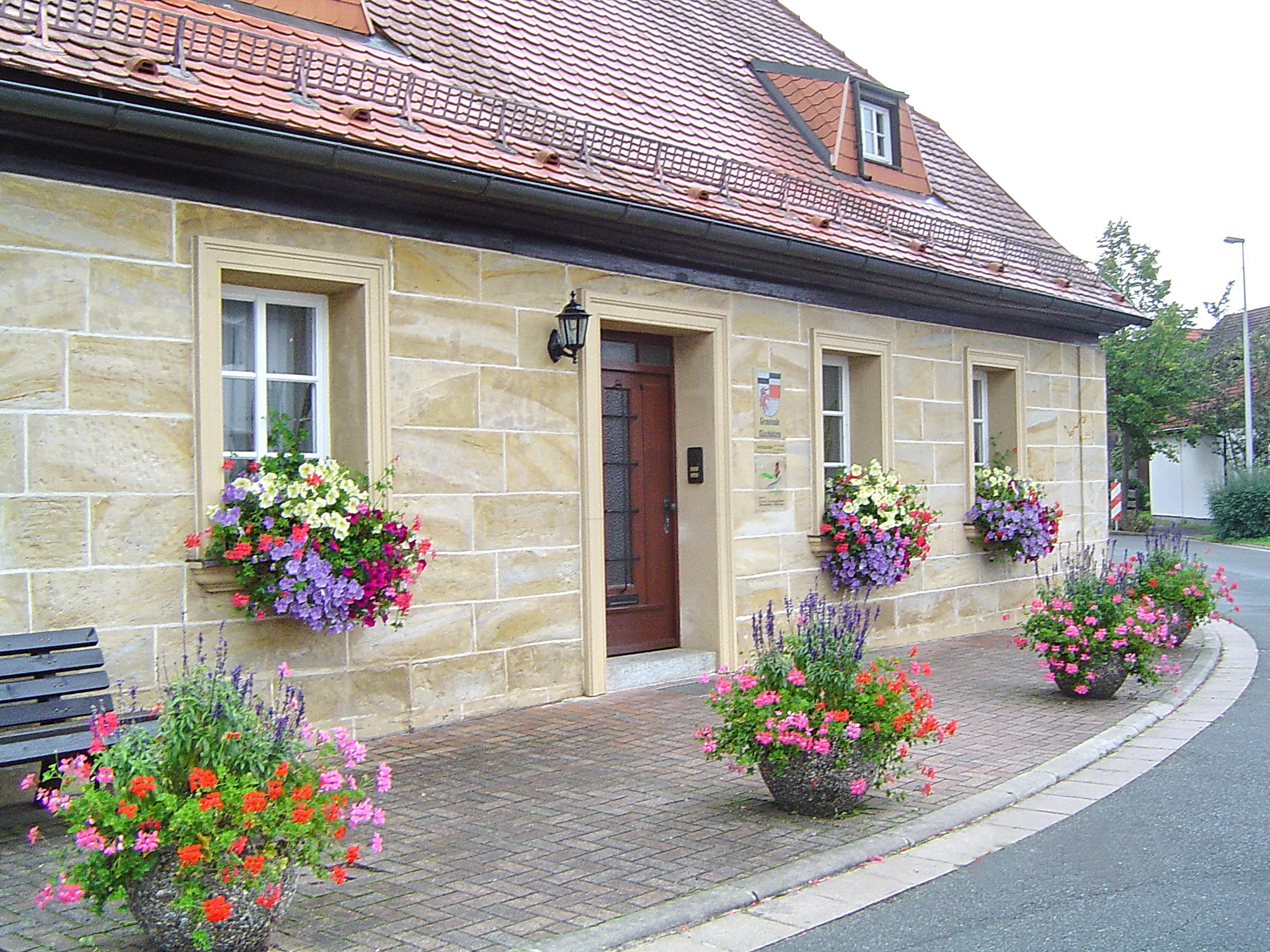 Glashütten, Gemeindehaus